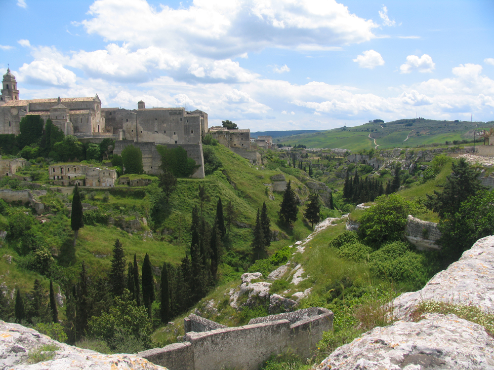 Vista della Cattedrale e del torrente La "Gravina"